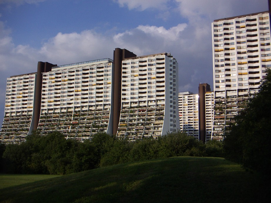 Wohnpark Alterlaa (Westseite), Architekt Harry Glück